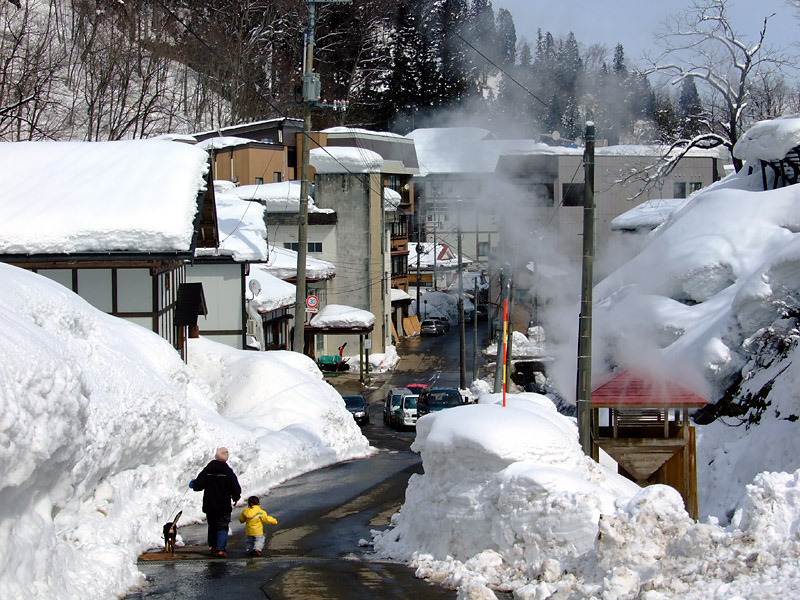 不動の滝を背にして見る、松之山温泉の町並み。道路右側にある灰色の大きな建物は「鷹ノ湯」。